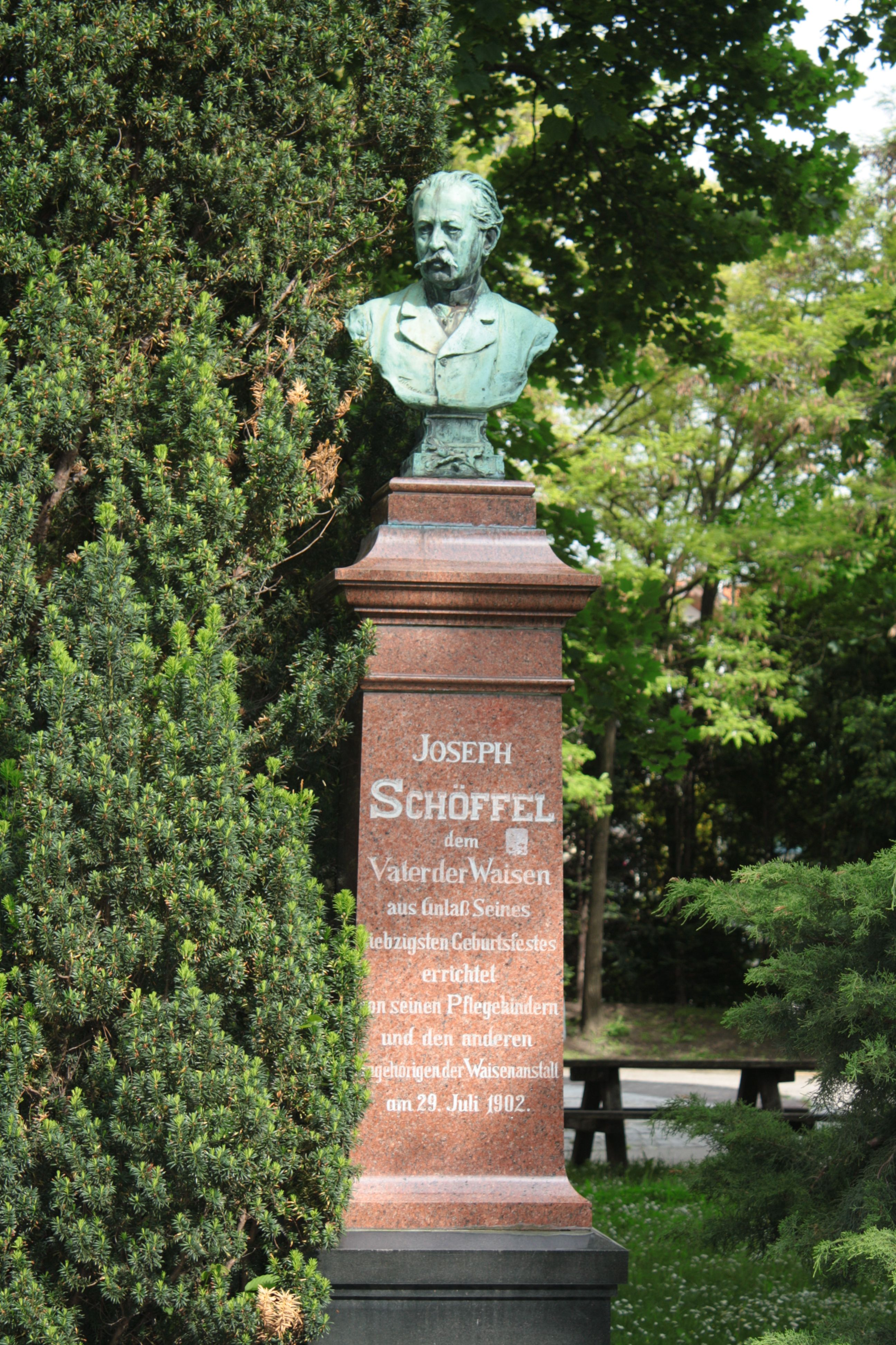 Schöffeldenkmal im Schöffelpark in Mödling in Niederösterreich